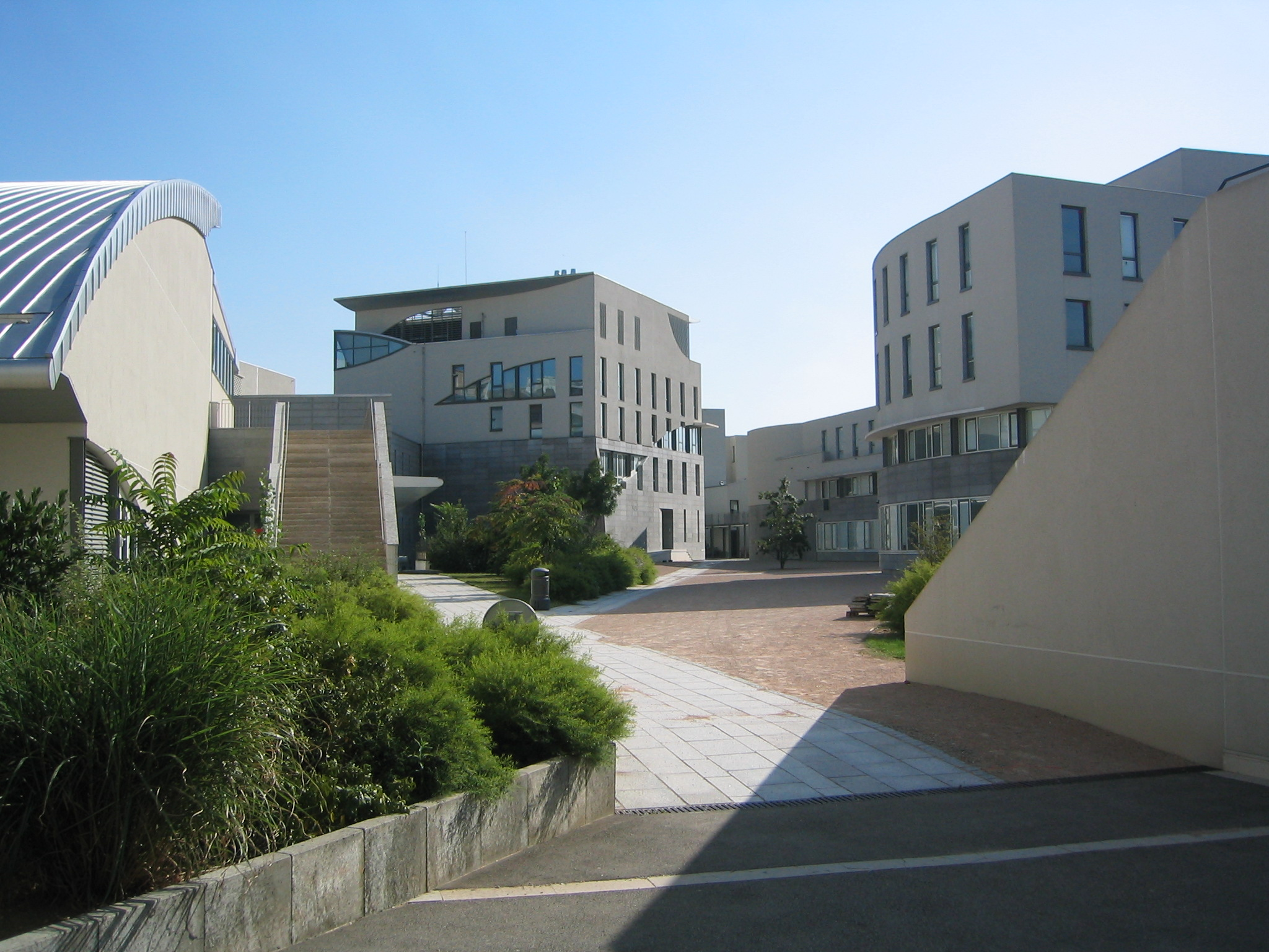 L'Ecole normale supérieure ENS-LSH à Lyon